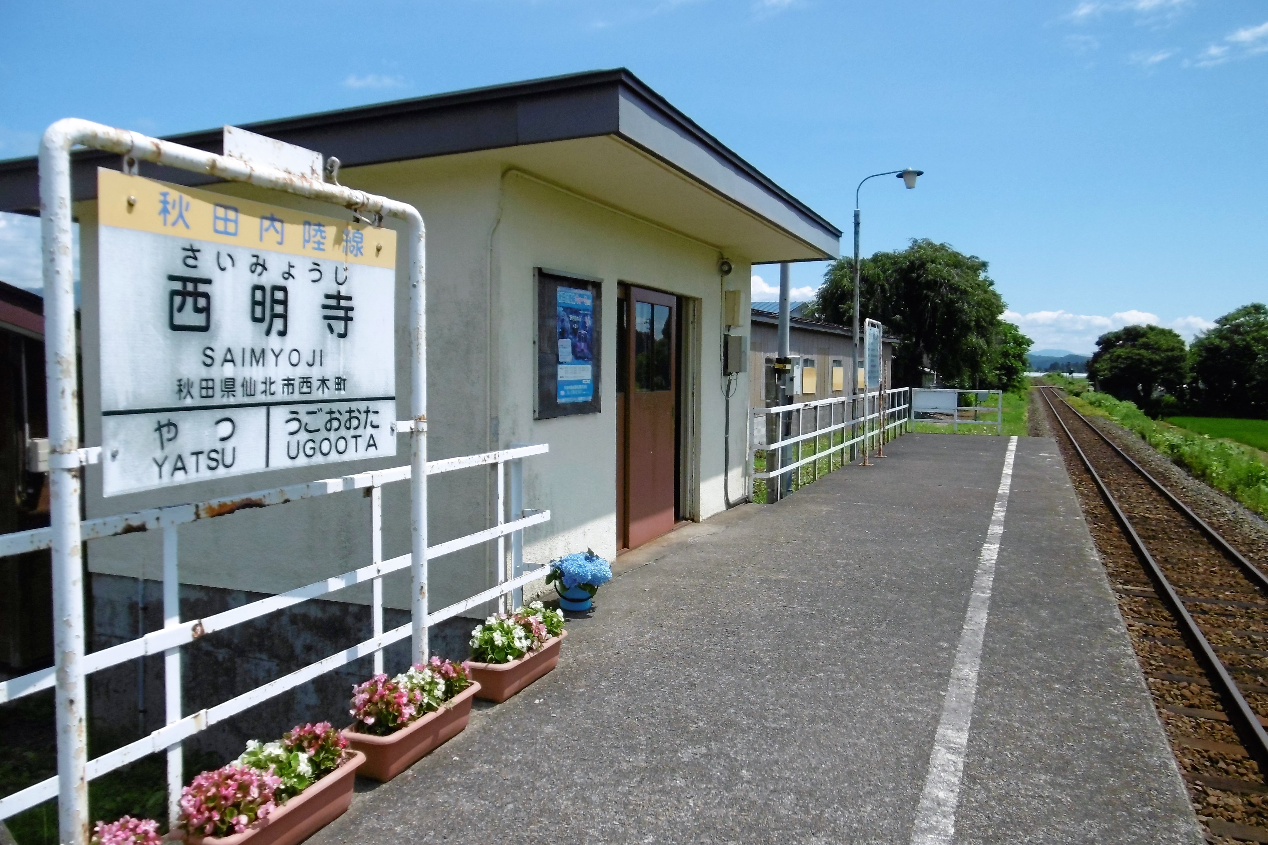 秋田内陸縦貫鉄道・西明寺駅：秋田県仙北市西木町